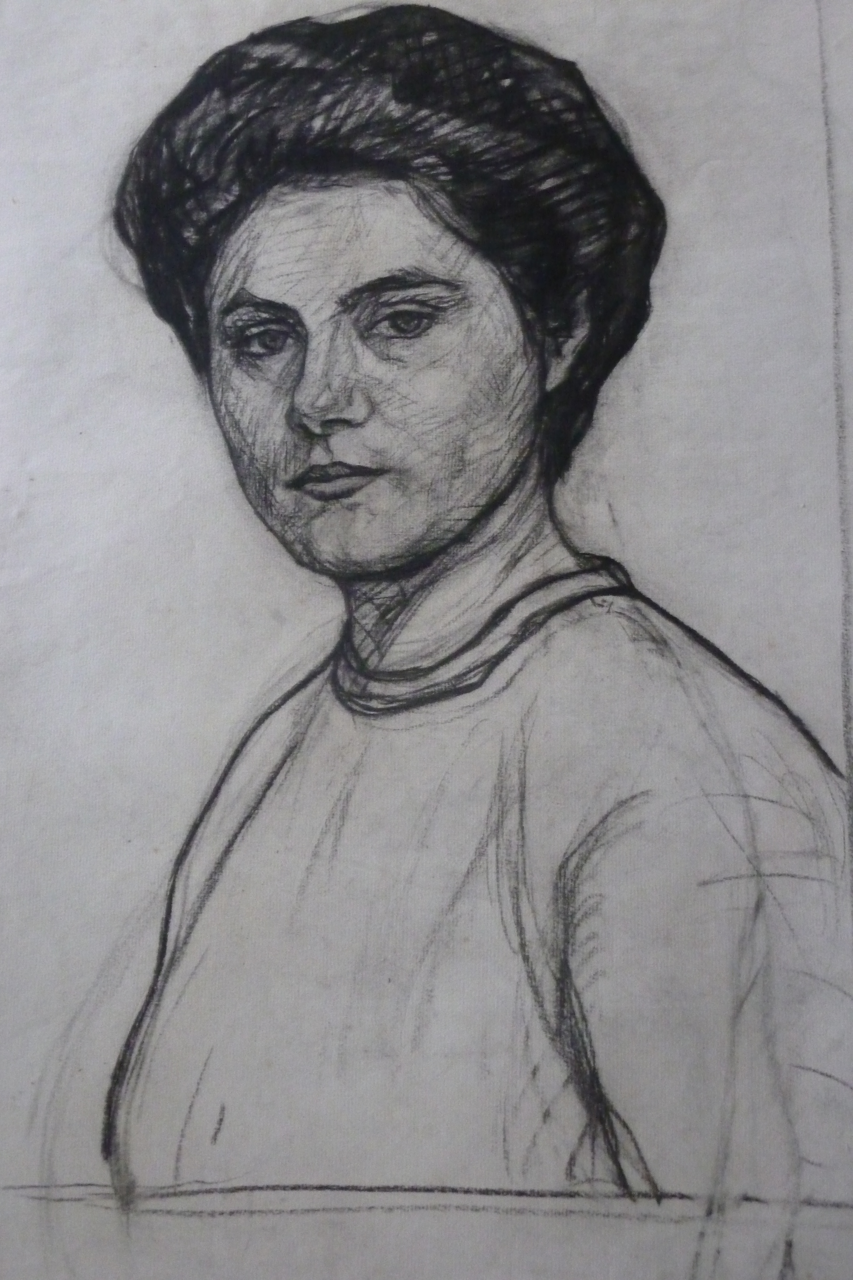 Die Zeichnung stellt die Malerin Doramaria Purschian dar. es ist ein Selbstportrait.